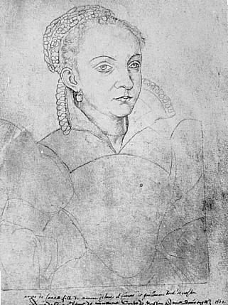 Portrait Anna von Sachsen